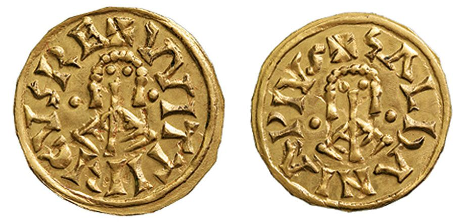 Reproducción moderna (siglo XX) de un tremis visigodo de oro acuñado en Saldaña ("Saldania") durante el reinado de Witerico. Leyendas: anverso "+VVITTIRICVSRE", reverso "+SALDANIAPIVS". Fuente: Ruth Pliego, La Moneda Visigoda, 2009, 970A. Conservación: EBC+.